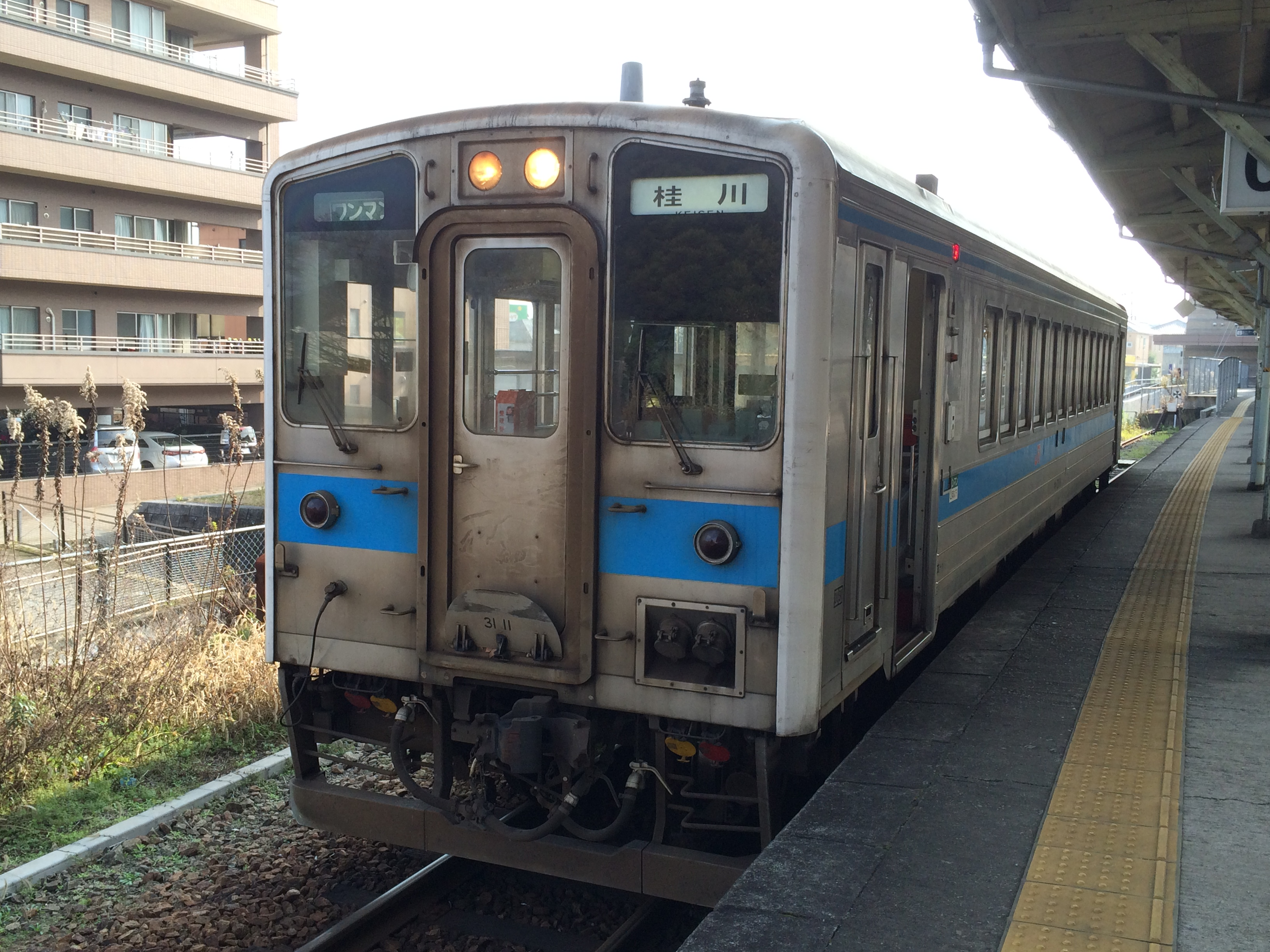 JR九州キハ31形気動車（原田駅で撮影）